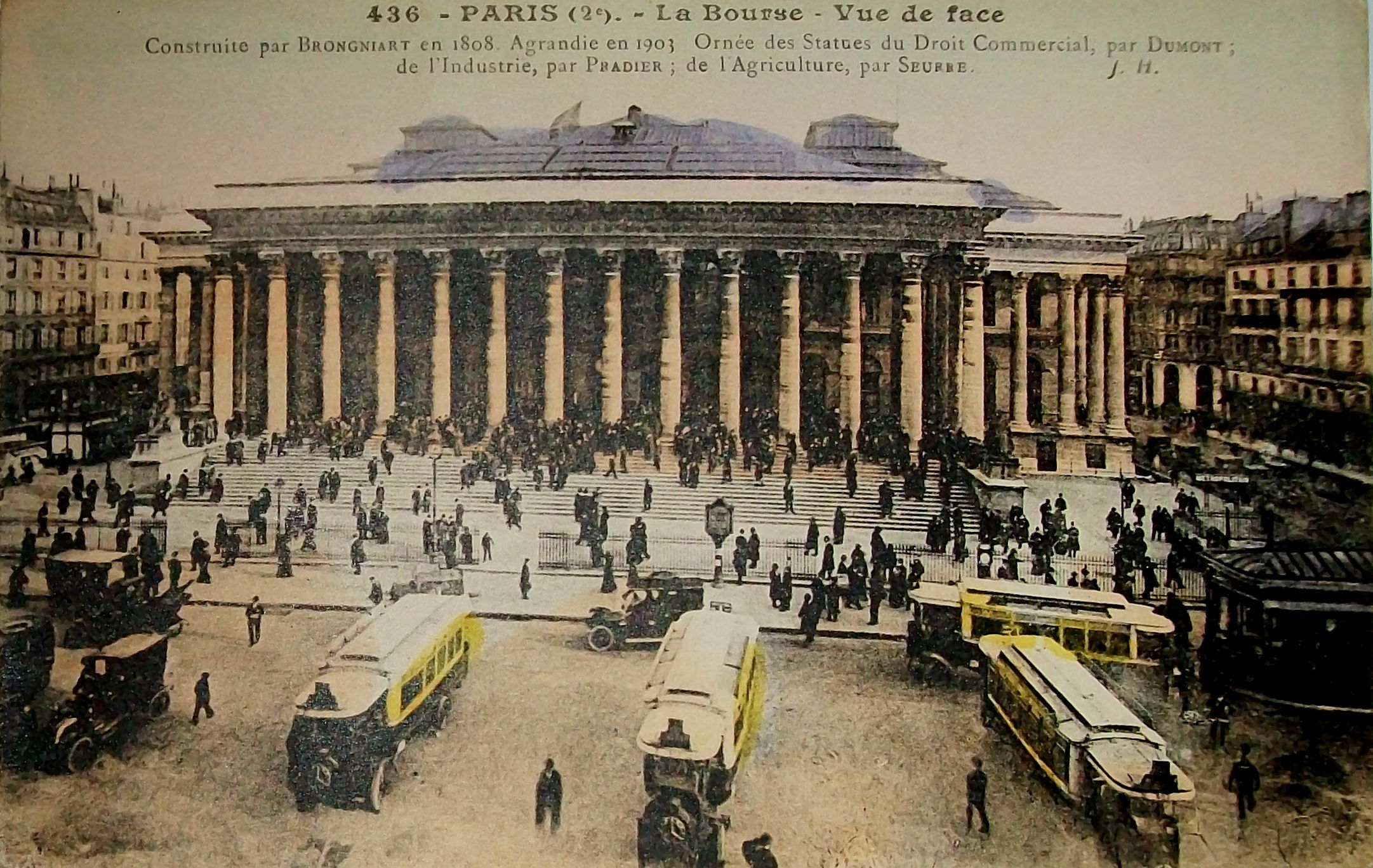 Pohľadnica budovy parížskej burzy z roku 1900.